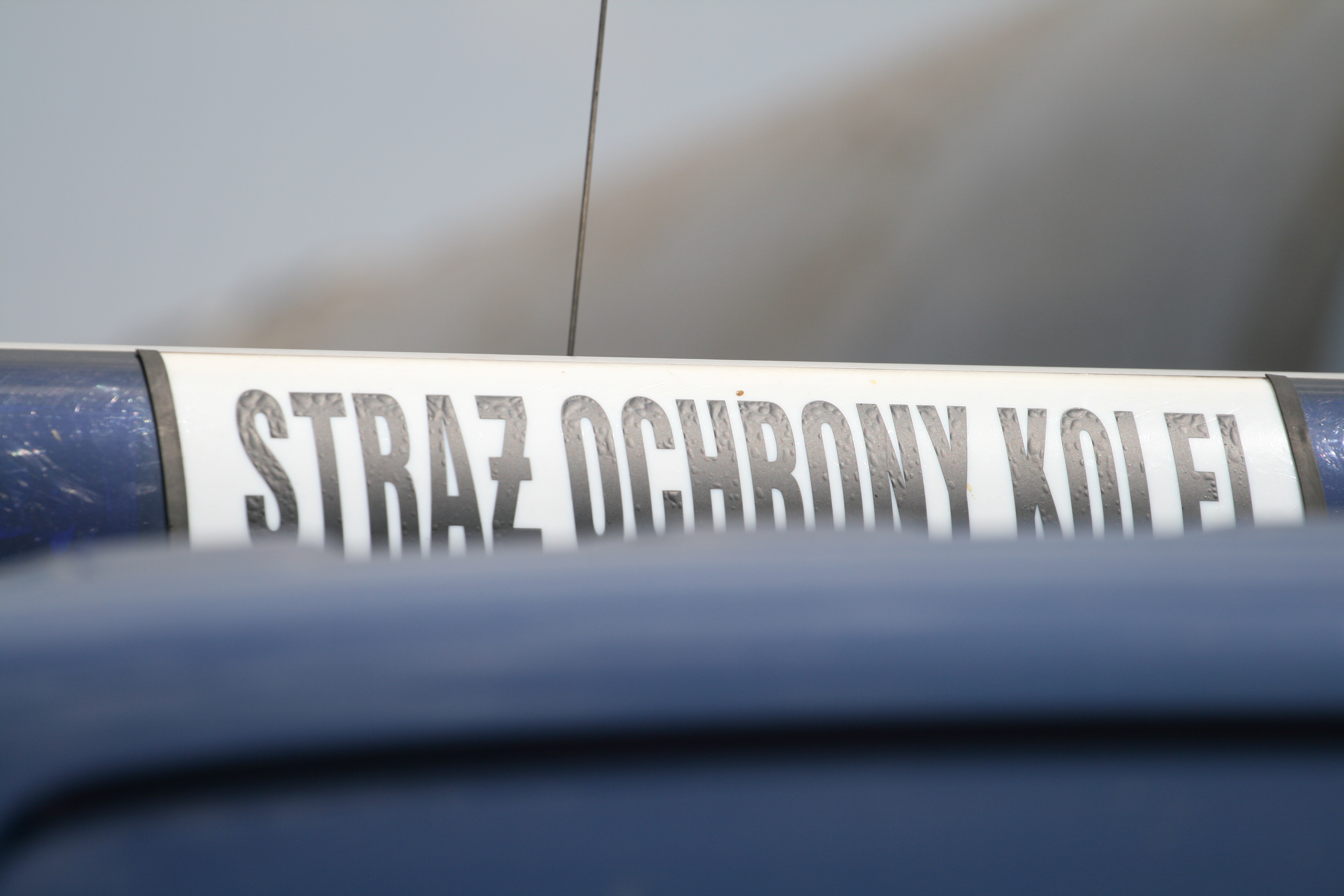 Straż Ochrony Kolei